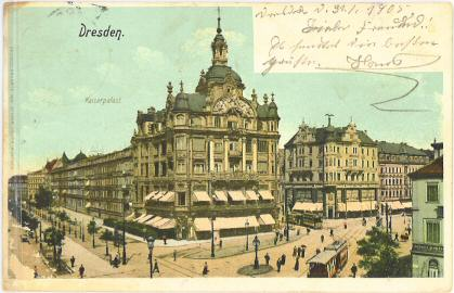 Kaiserpalast, um 1905, Pirnaischer Platz, Dresden (erbaut 1895 bis 1897 als Geschäftshaus Ilgen)